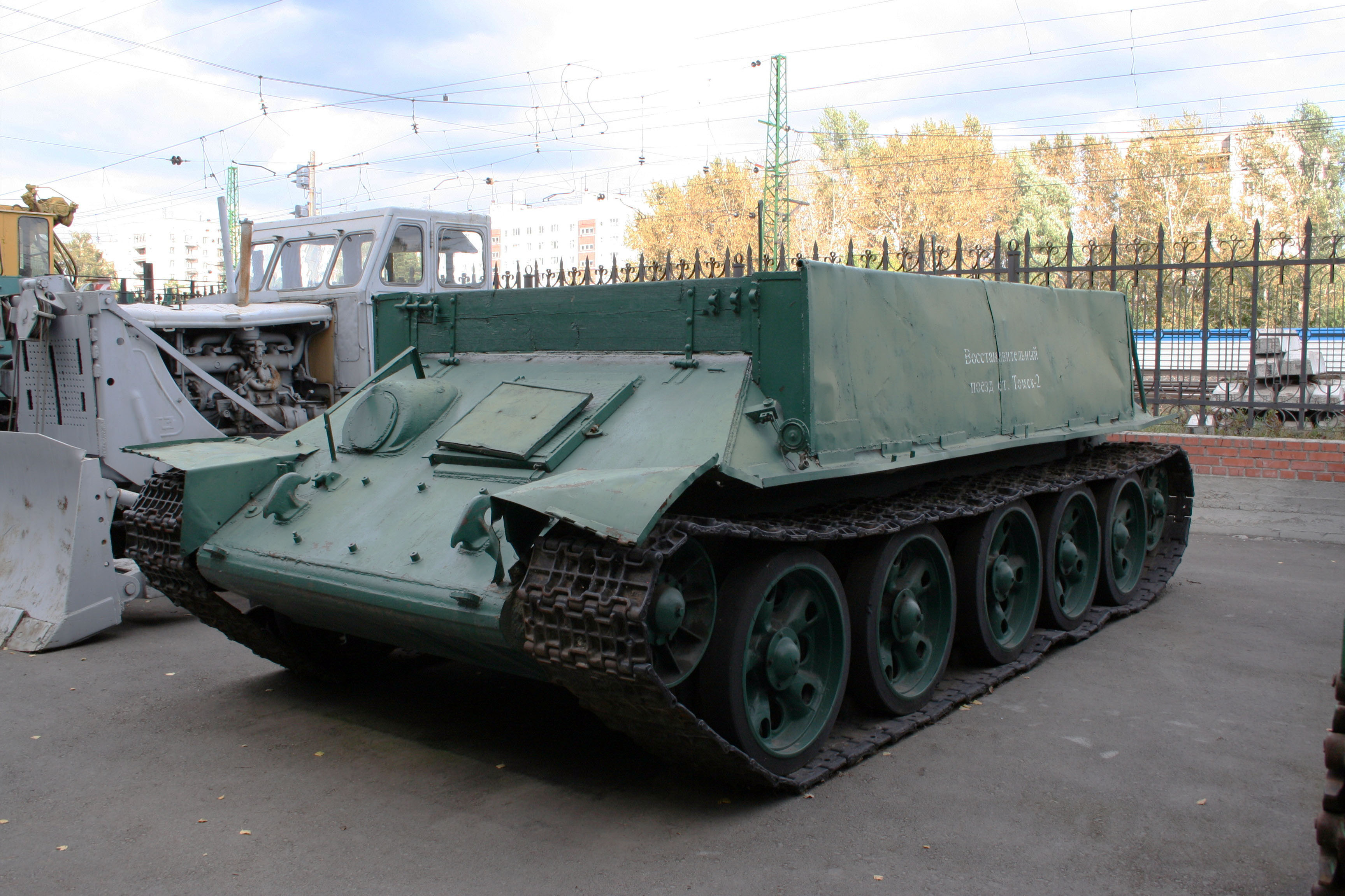 Тягач гусеничный Т-34Т in Novosibirsk Railway Museum